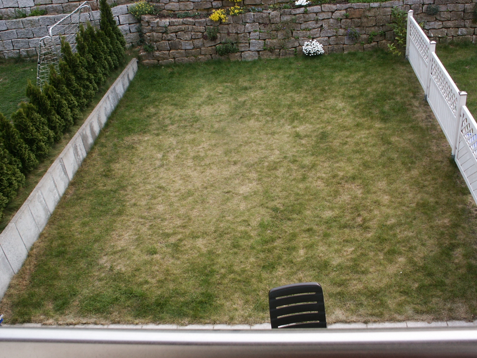 Schadhafte Rasenfläche eines Reihenmittelhauses in Frankfurt vor dem Vertikutieren